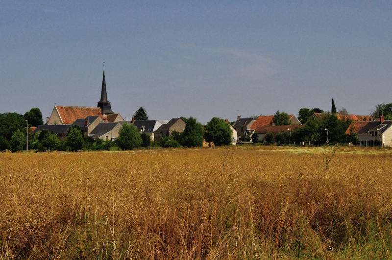 Vue générales de Bommiers (Indre)